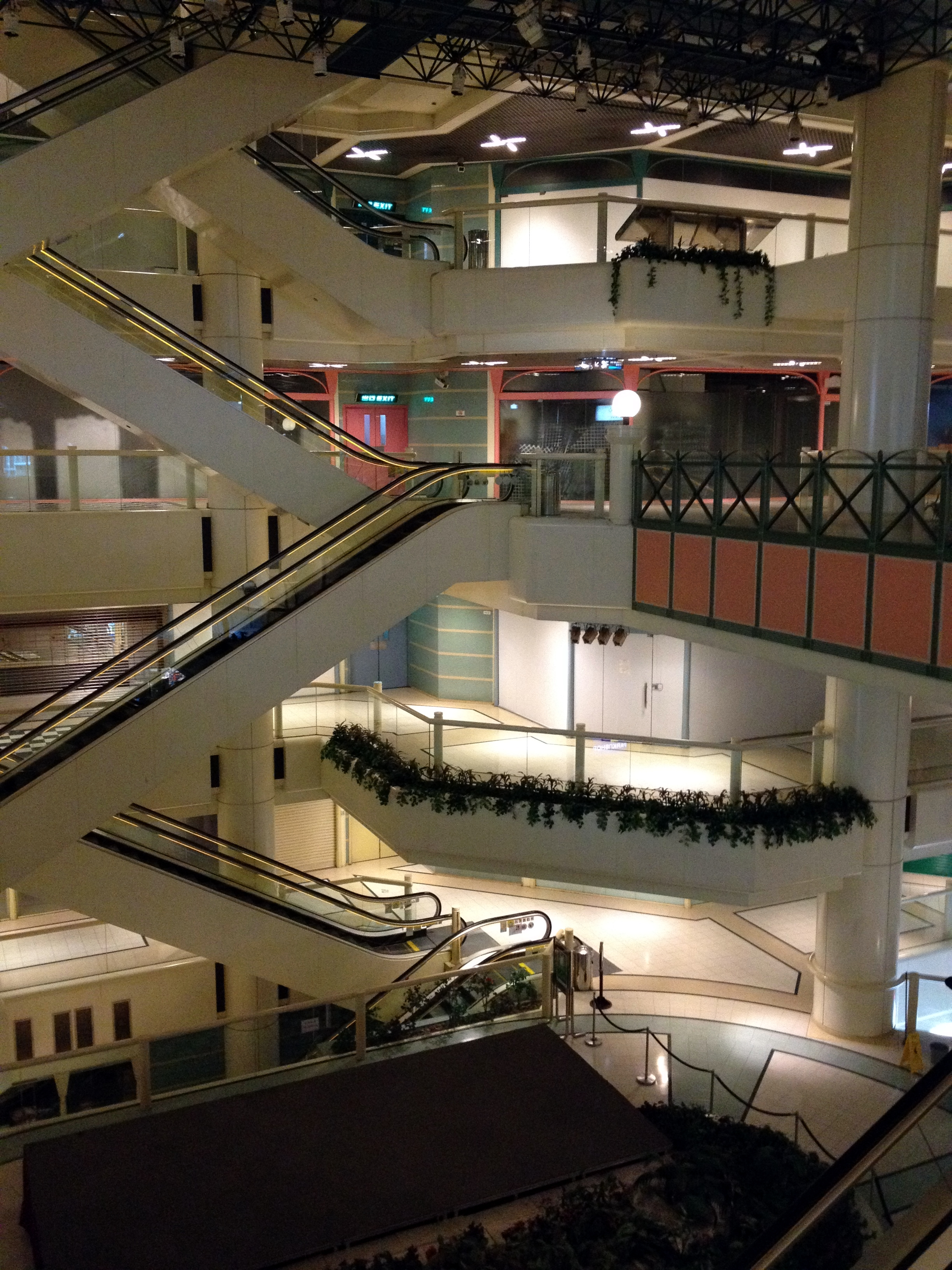 Riviera Plaza Void